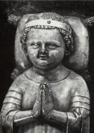 Gisant de Jean Ier de France, fils posthume de Louis X le Hutin et de Clémence de Hongrie.